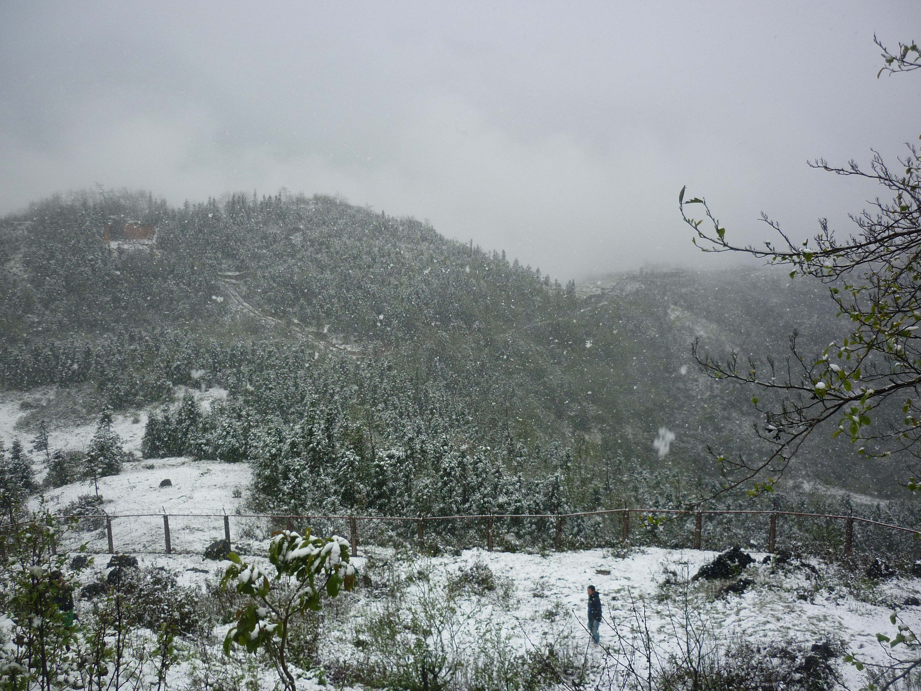 Phong cảnh Sapa trong tuyết trắng ngày 16/3/2011